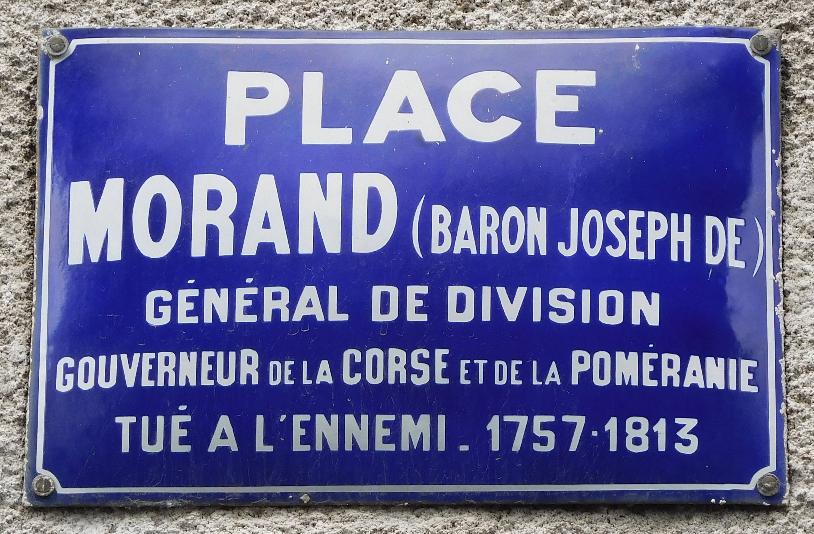 Plaque concernant Joseph Morand, place Morand, près du pont sur l'Isle, Mussidan, Dordogne, France.